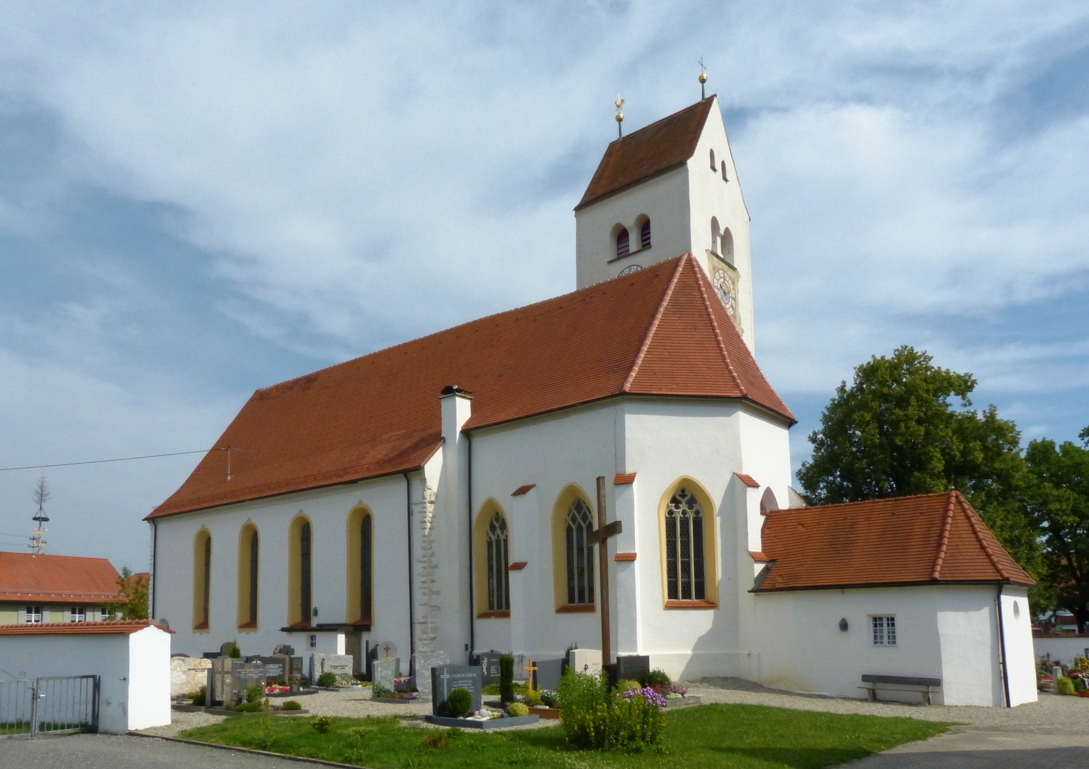 St. Afra Betzigau, Landkreis Oberallgäu, Bayern; Blick aus SüdOst, Sicht auf Langhaus und eingezogenem Chor (Vordergrund), Dahinter der Turm; Am Chor angebaut die Sakristei